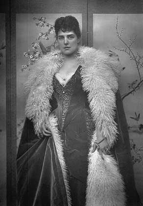 Jennie Churchill